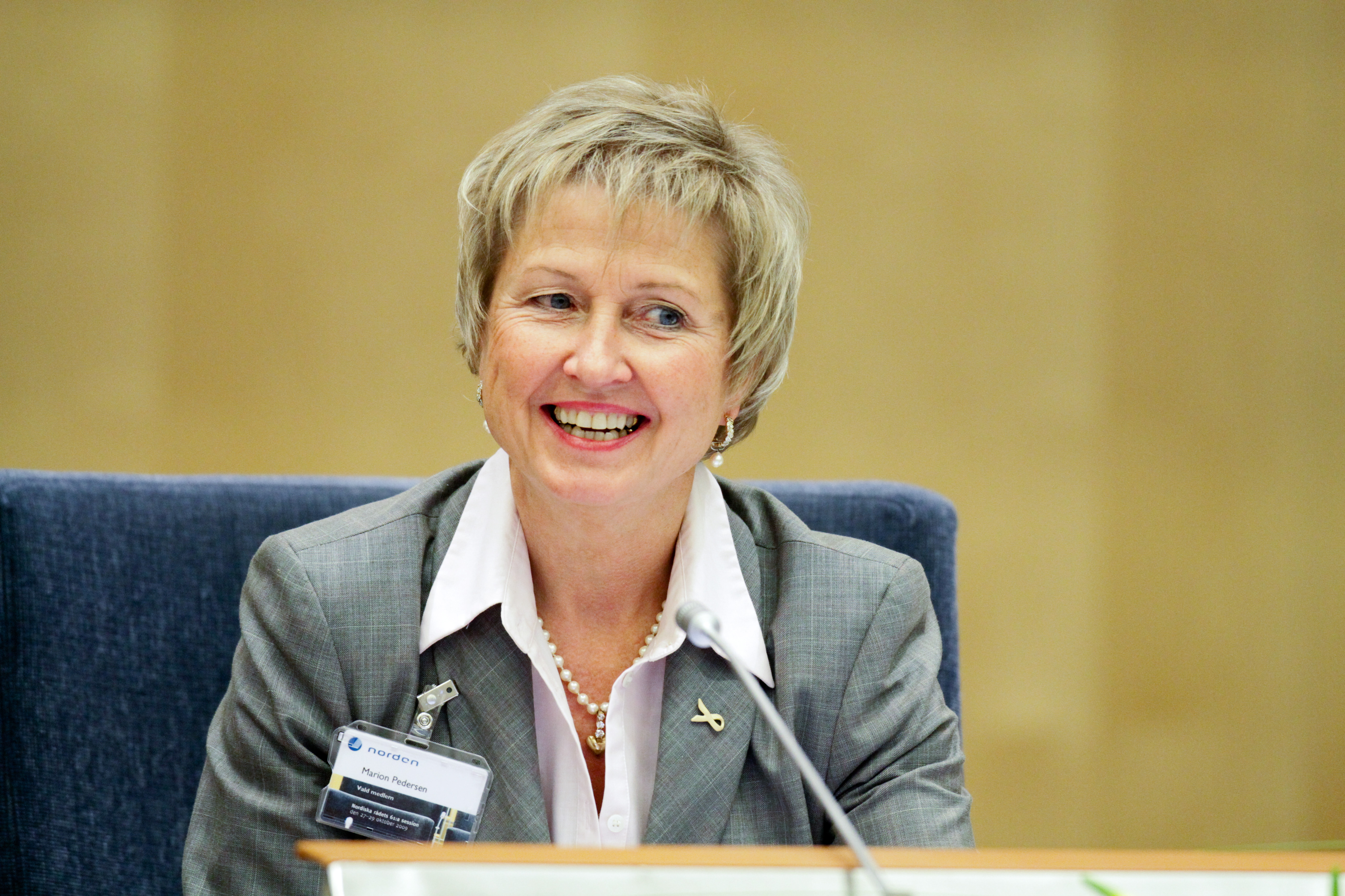 Marion Pedersen vid Nordiska Rådets session i Stockholm.